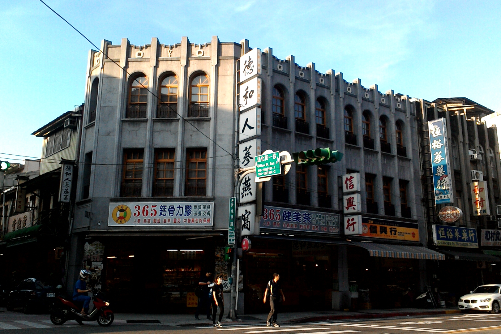 德和人蔘燕窩,台北市大同區延平次分區大有里